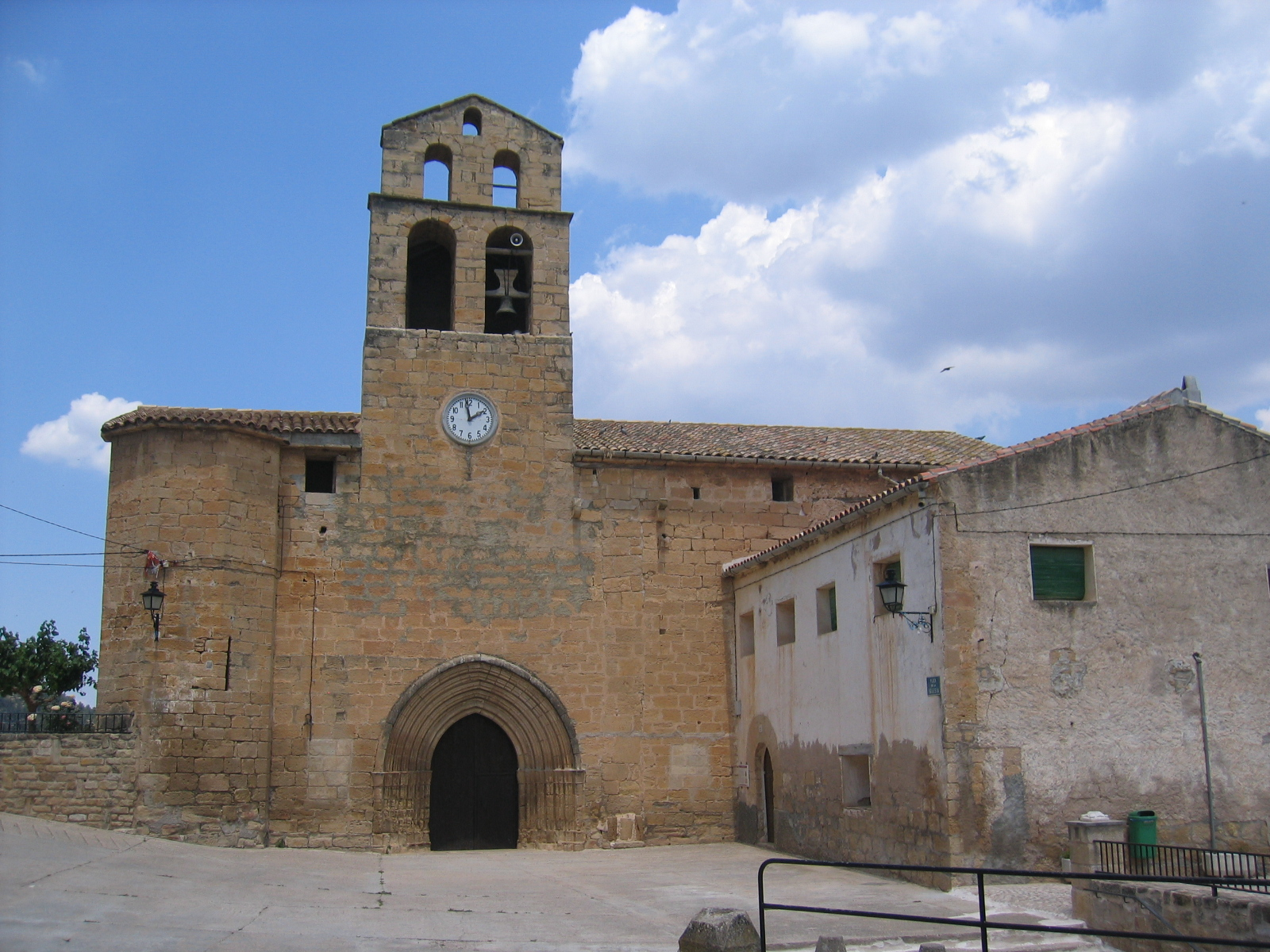 Se trata de una sencilla construcción del s.XIV perteneciente a un grupo de edificios erigidos en el Bajo Aragón siguiendo la austera y funcional corriente gótico-levantina. Consta de amplia nave única con varias capillas laterales, ampliadas las del lado del Evangelio en el s.XVII, y cabecera recta flanqueada por dos capillas rectangulares. La nave se cubre con bóveda de cañón apuntado mientras que la cabecera lo hace con bóveda de crucería sencilla. El interior destaca por su sobriedad, acentuada por el uso en la fábrica de sillar bien escuadrado, en la actualidad a cara vista. Exteriormente destacan el óculo de la cabecera y la ventana apuntada con tracería del hastial de los pies, como únicos vanos de iluminación. Asimismo presenta una portada en arco apuntado enmarcada por cinco arquivoltas abocinadas y flanqueada a la izquierda por un torreoncillo octogonal que envuelve la caja de escaleras que da acceso al coro alto y a la derecha por una elevada espadaña.